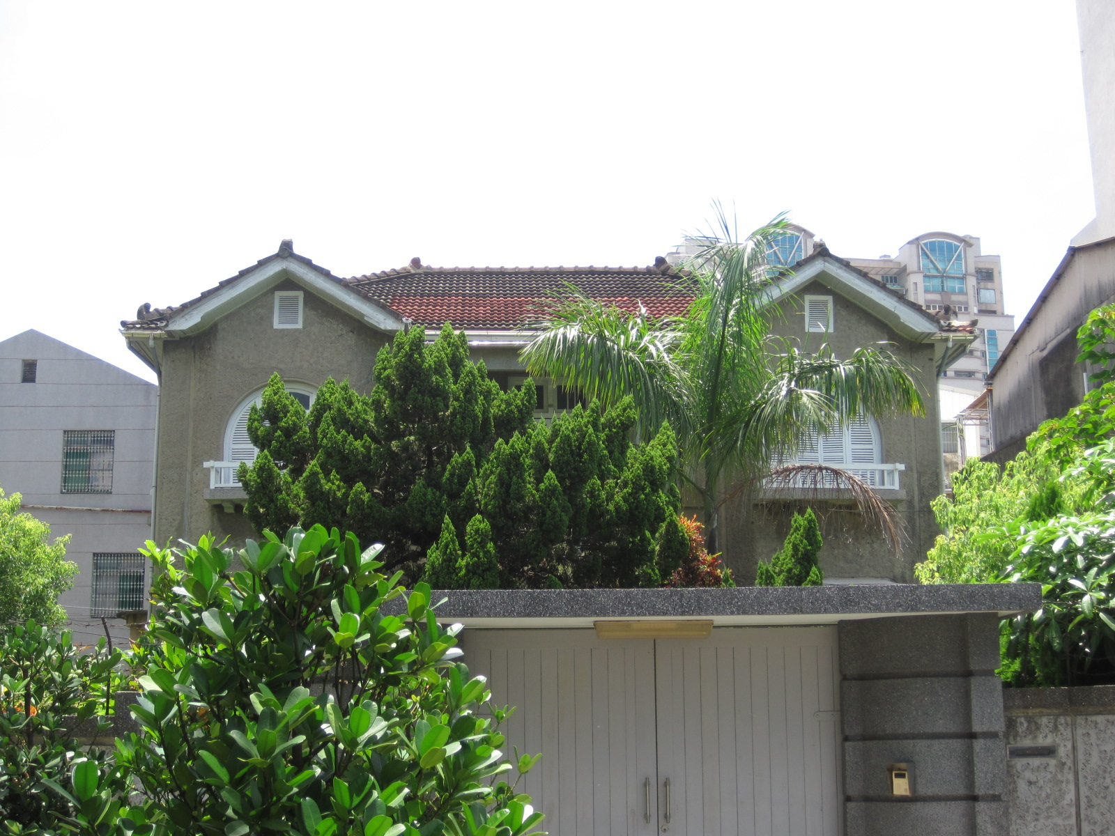 臺南陳一鶴宅